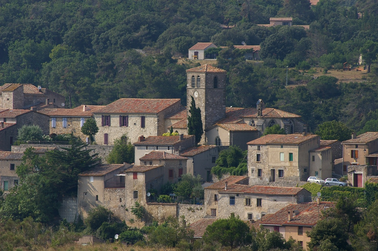 Aragon, Aude, France